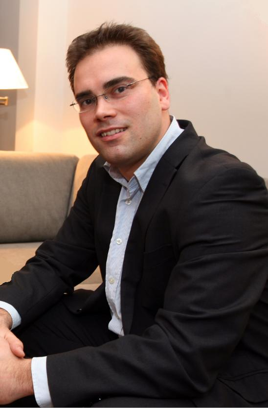 Antoine Tanzilli, portrait